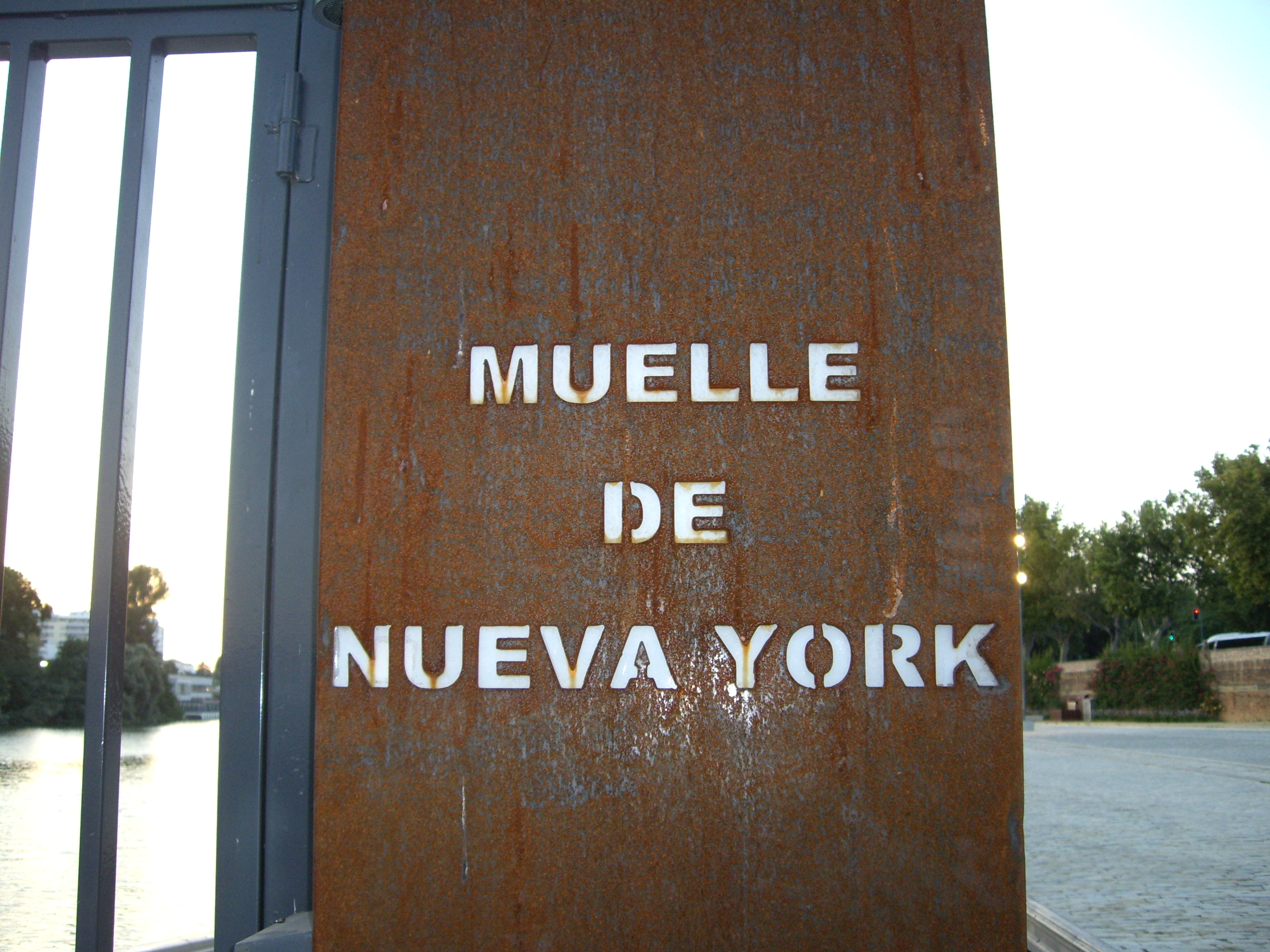 Letrero en un embarcadero del Muelle de Nueva York de Sevilla